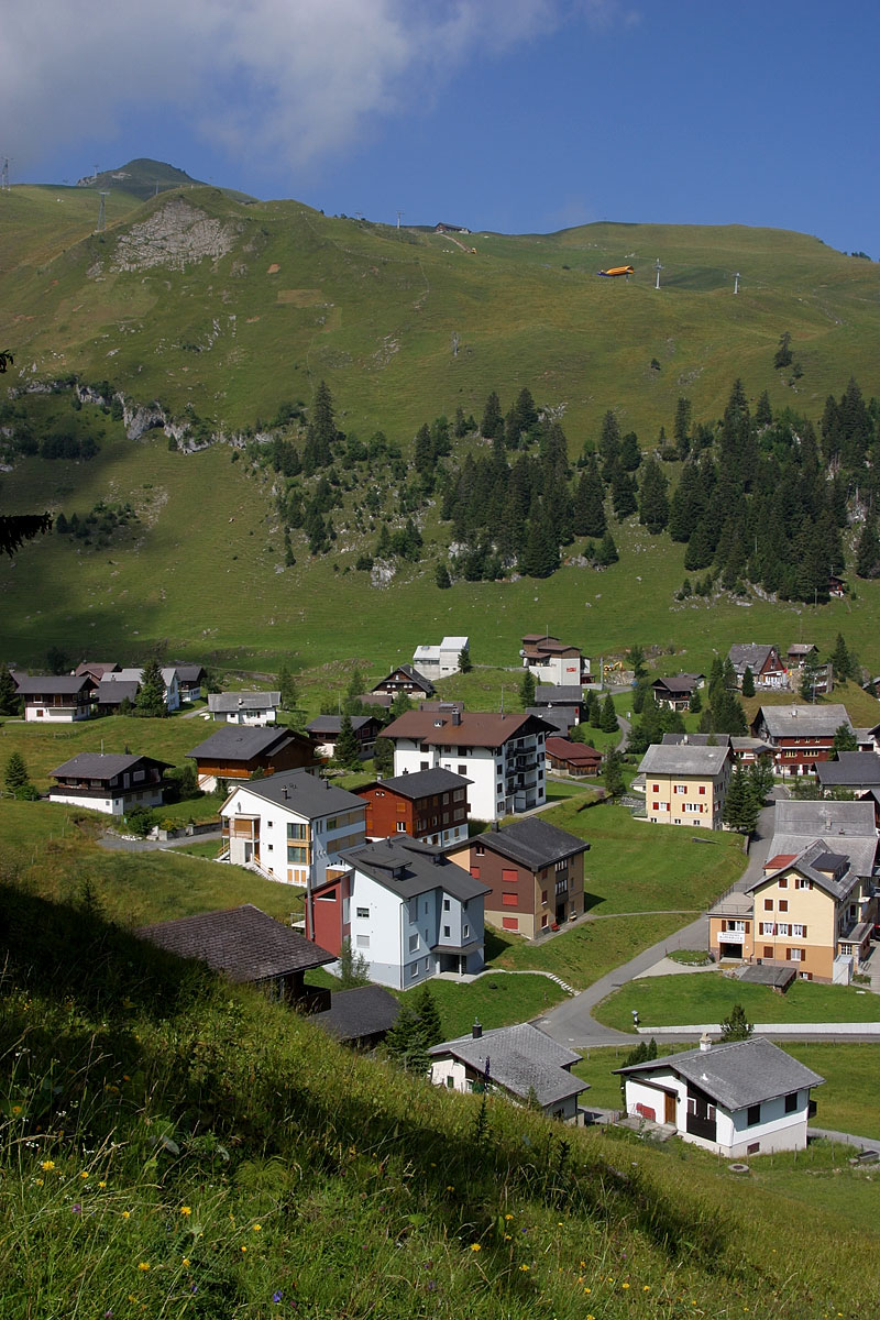 Blick auf Stoos